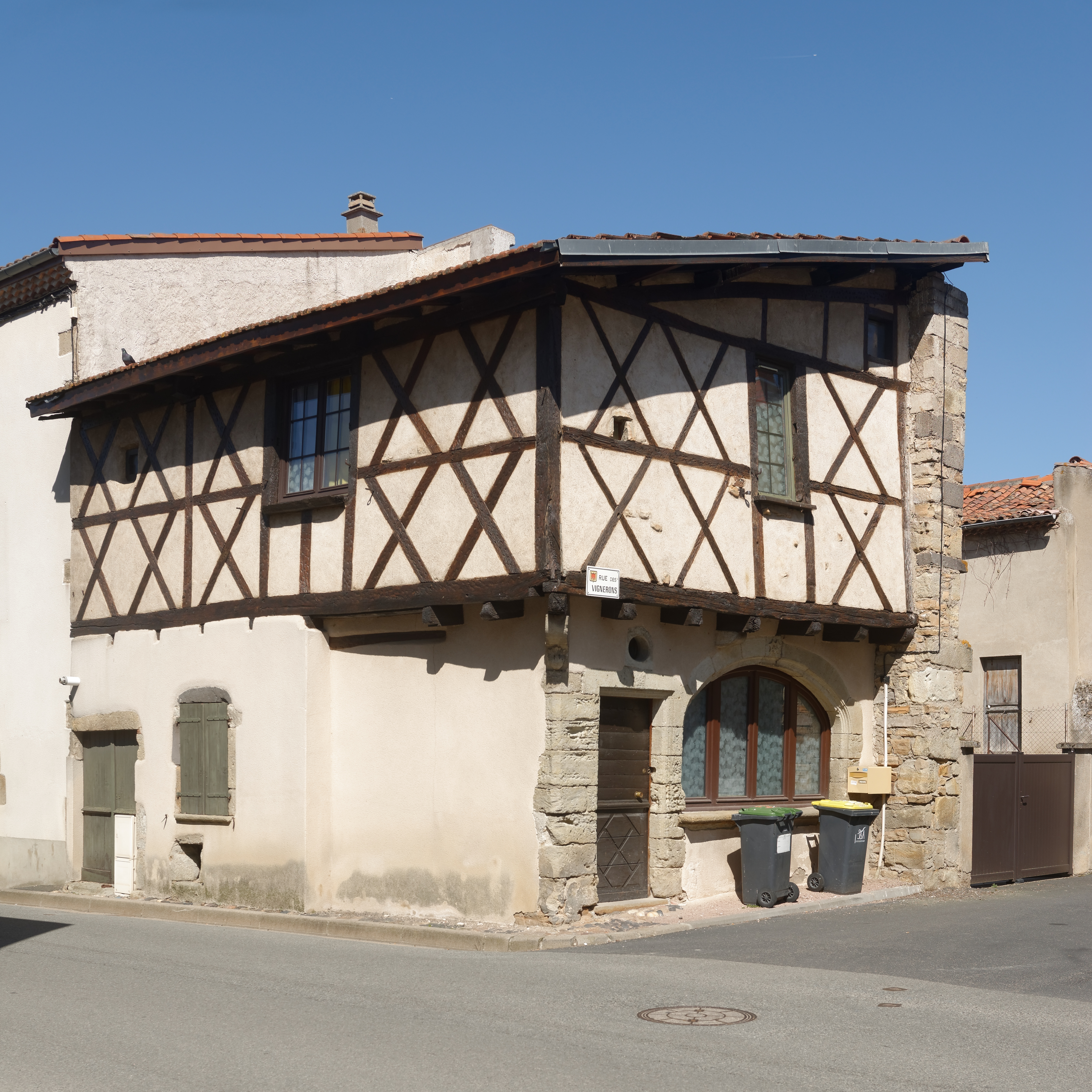 Maison à pans de bois datée de 1571, inscrite aux Monuments historiques (façades et toiture sur rue). Grande Rue de Beauregard-l'Évêque, dans le Puy-de-Dôme.